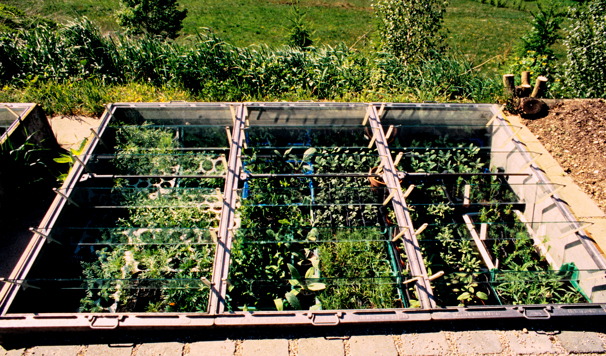 Frühbeetkasten mit selbstlüftenden lamellenartigen Fenstern im Querbeetgarten, Fensterrahmen aus Aluminiumguss, die Produktion wurde 1985 eingestellt, geeignet für Jungpflanzenanzucht